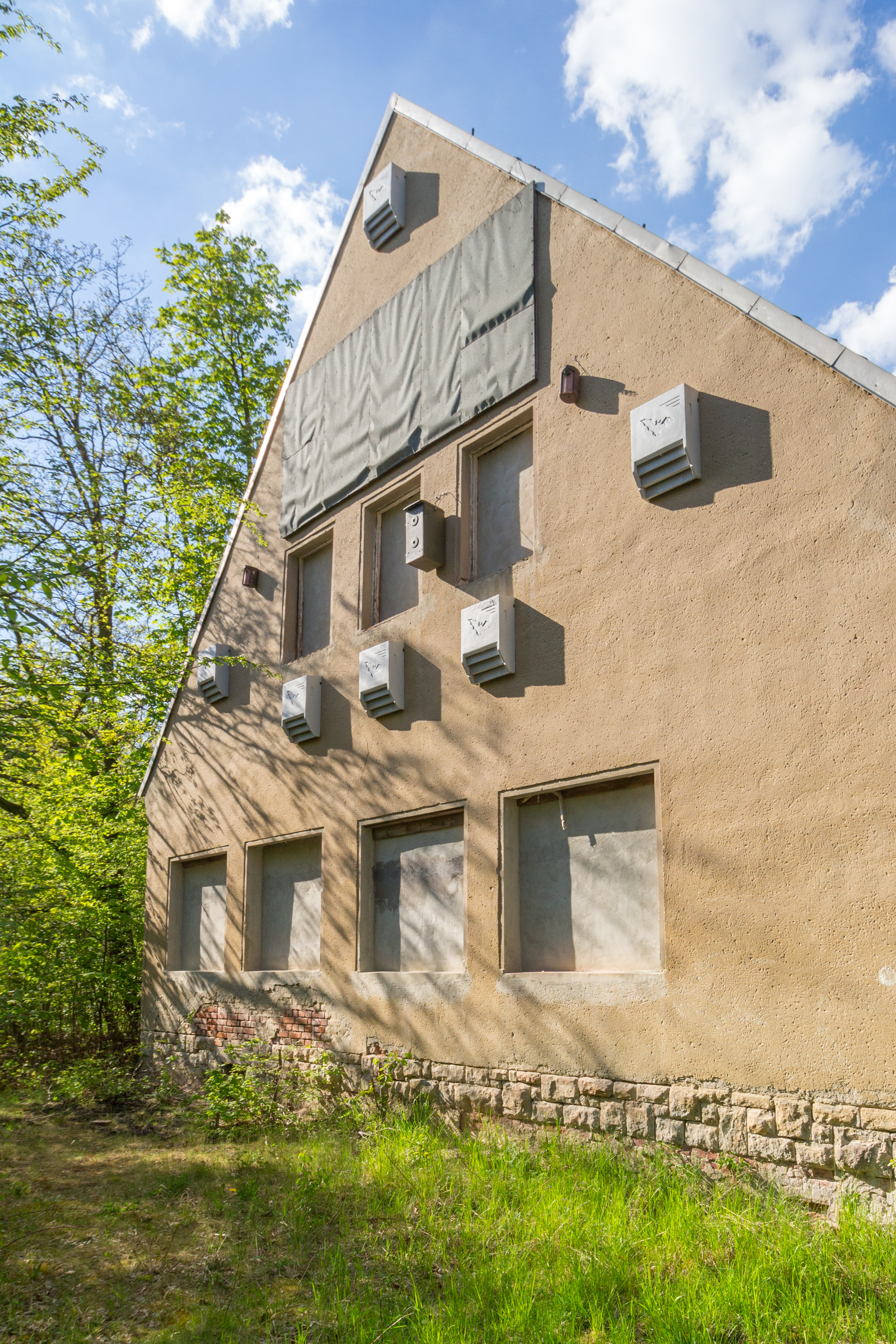 Landschaftsschutzgebiet „Mittleres Saaletal“: Als Fledermausquartier dienendes Gebäude (mit mehreren Fledermauskästen) auf dem Gelände der ehemaligen Flak-Kaserne Jena-Lichtenhain, hergerichtetes im Rahmen einer Ausgleichsmaßnahme zum Bau des Jenaer Teilabschnitts der Bundesautobahn A4